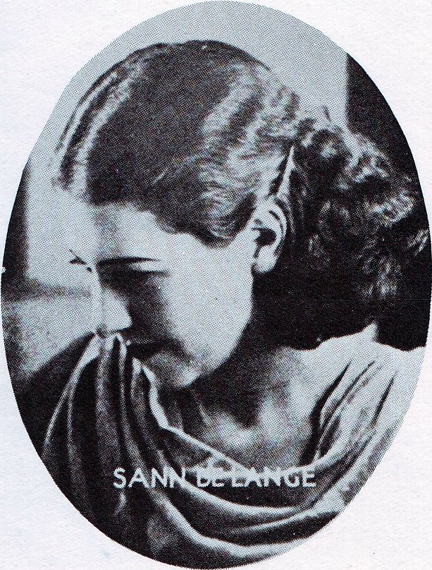 Die Suid-Afrikaanse toneelspeelster Sann de Lange.